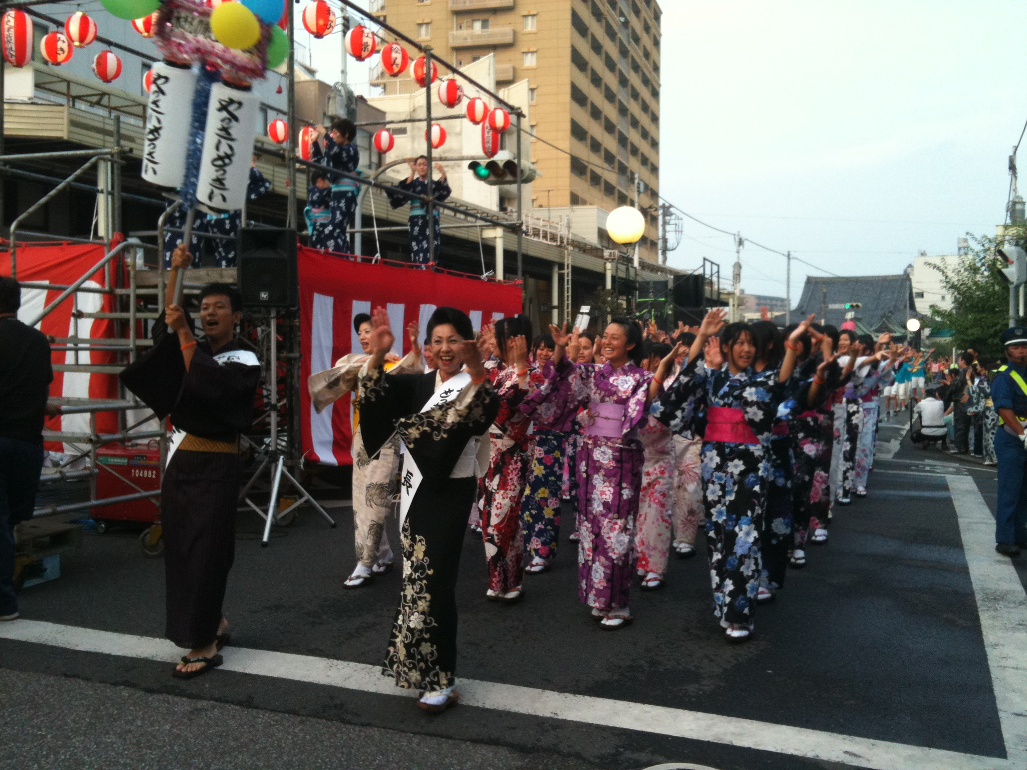 第64回木更津港まつり「やっさいもっさい踊り大会」 平成23年8月13日（土曜日）午後5時45分ごろ撮影